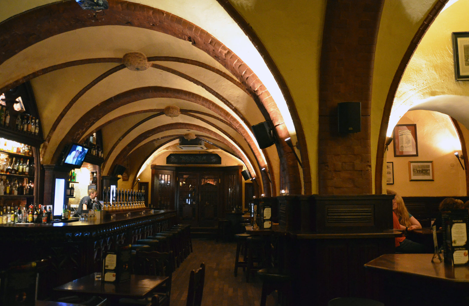 Unterhalb des Europahauses in Hannover, dem ersten nach dem Zweiten Weltkrieg neu erbauten und heute denkmalgeschützten Büro- und Geschäftshaus an der Georgstraße (am Kröpcke Ecke Karmarschstraße) finden sich noch die historischen Kellergewölbe der Vorgängerbauten. Der englisch Pub Jack the Rippers hat hier als London Tavern einen englischen Pub im Stil des 19. Jahrhunderts eingerichtet ...